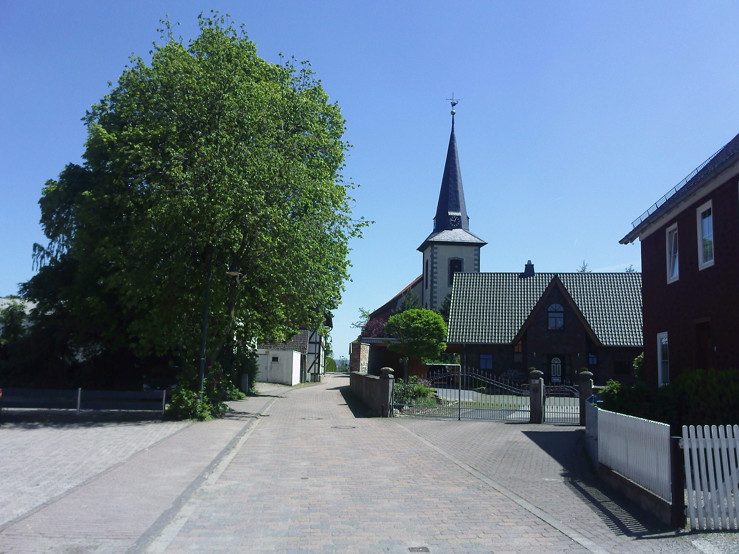 Die Kirchstraße in Banteln